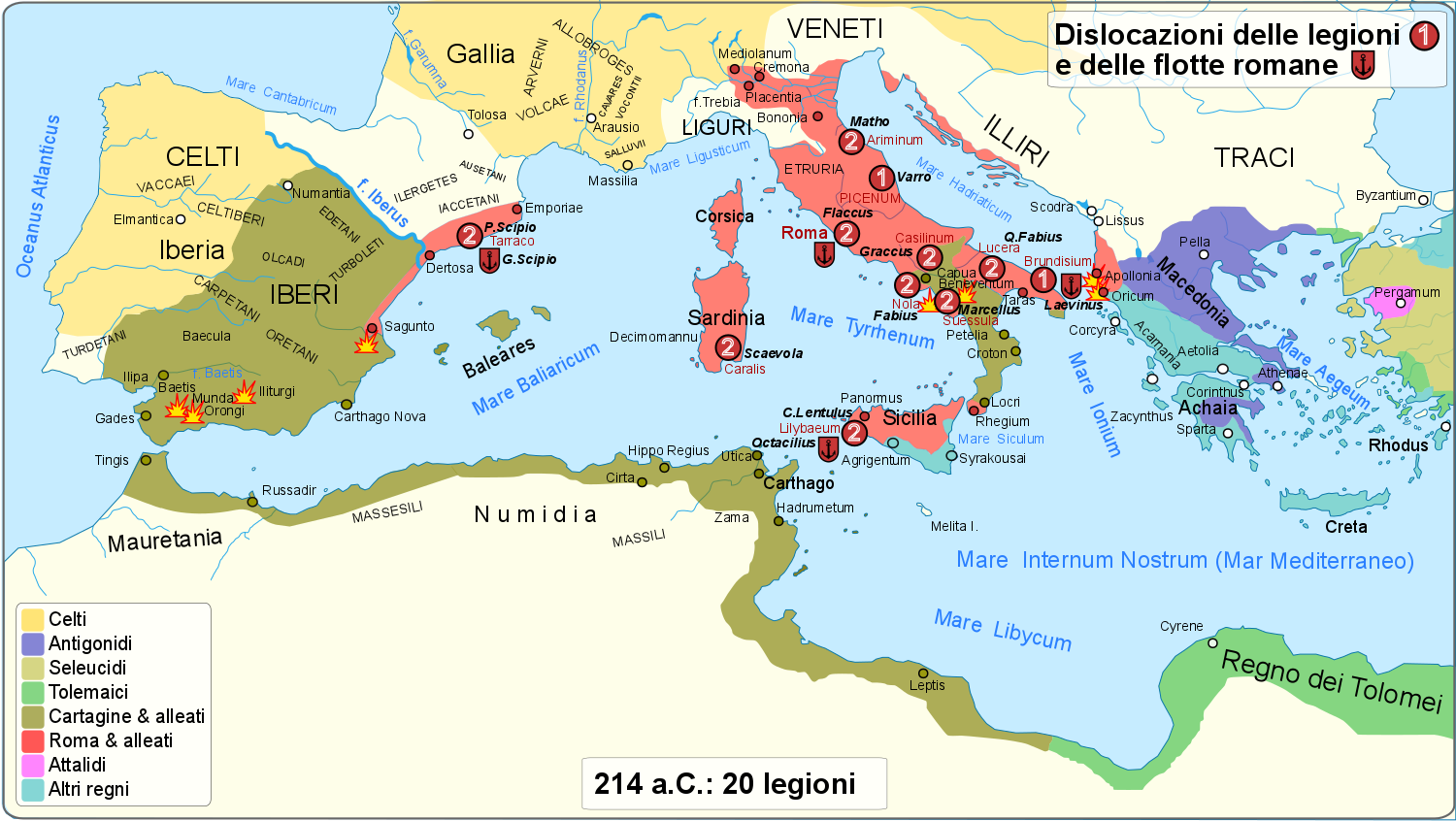 Dislocazione e dimensione delle armate romane nel 214 a.C. durante la seconda guerra punica